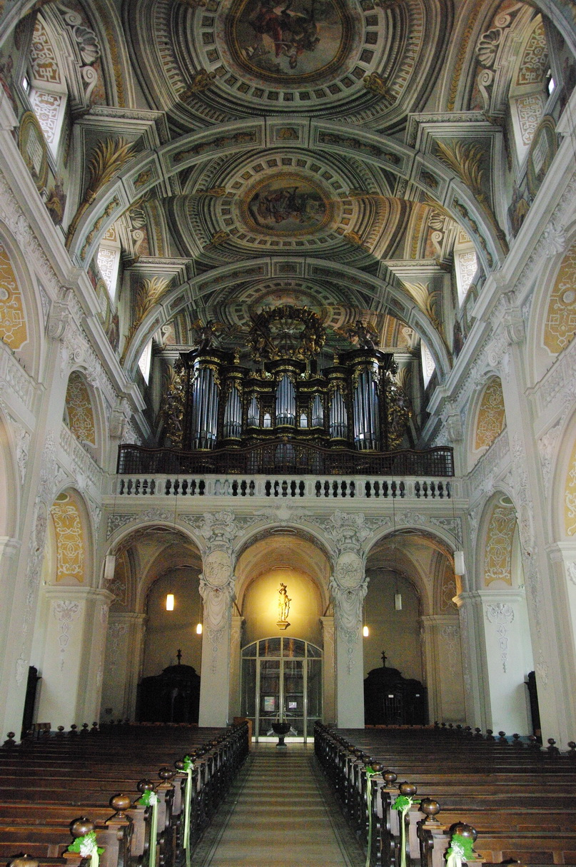 Orgel Basilika Walldüen